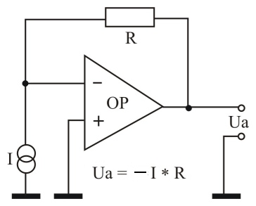 Transimpedanzverstärker mit OP